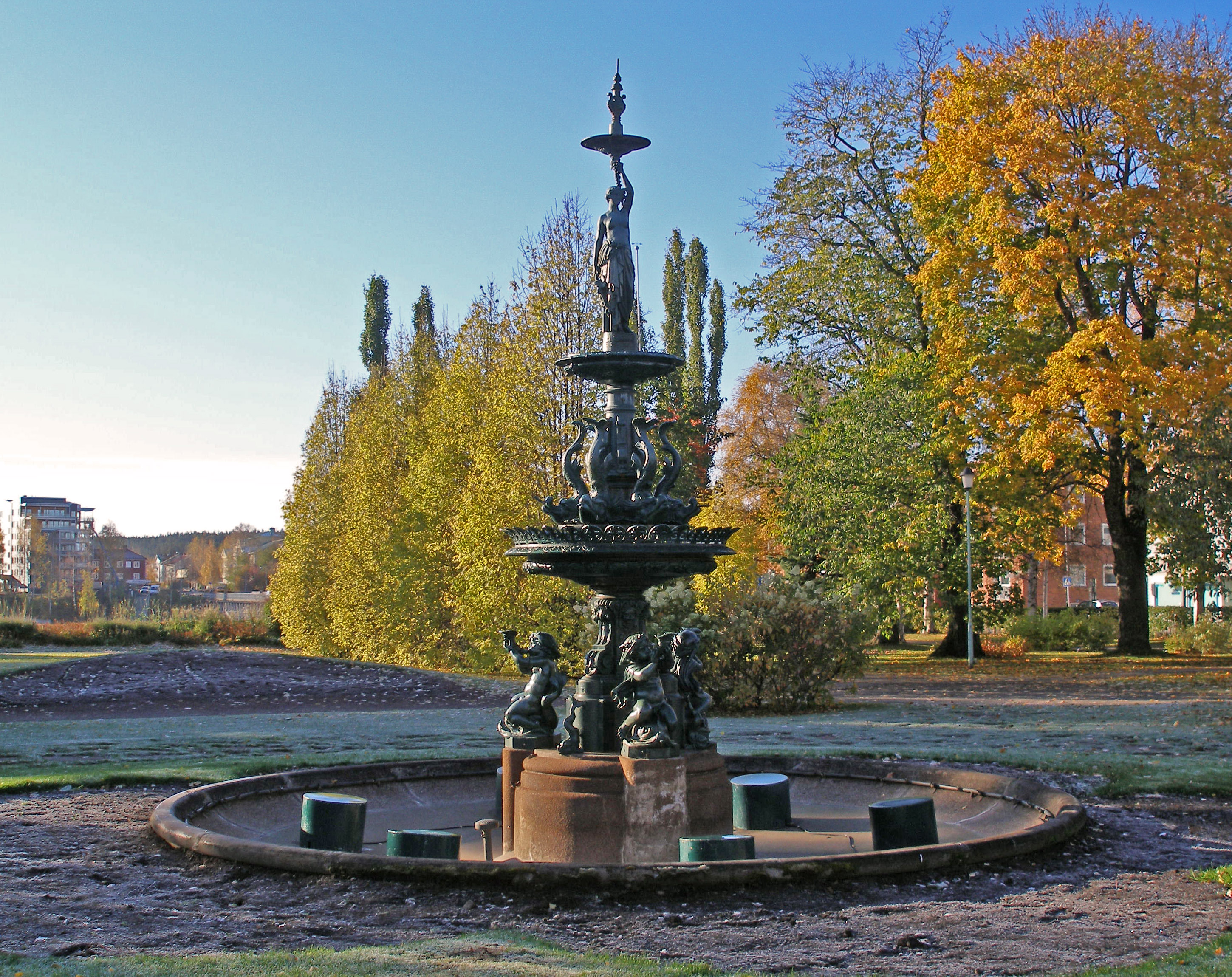 Fontänen "Johanna i parken" som invigdes 1898 till minne av Skellefteås första vattenledningar 1895.